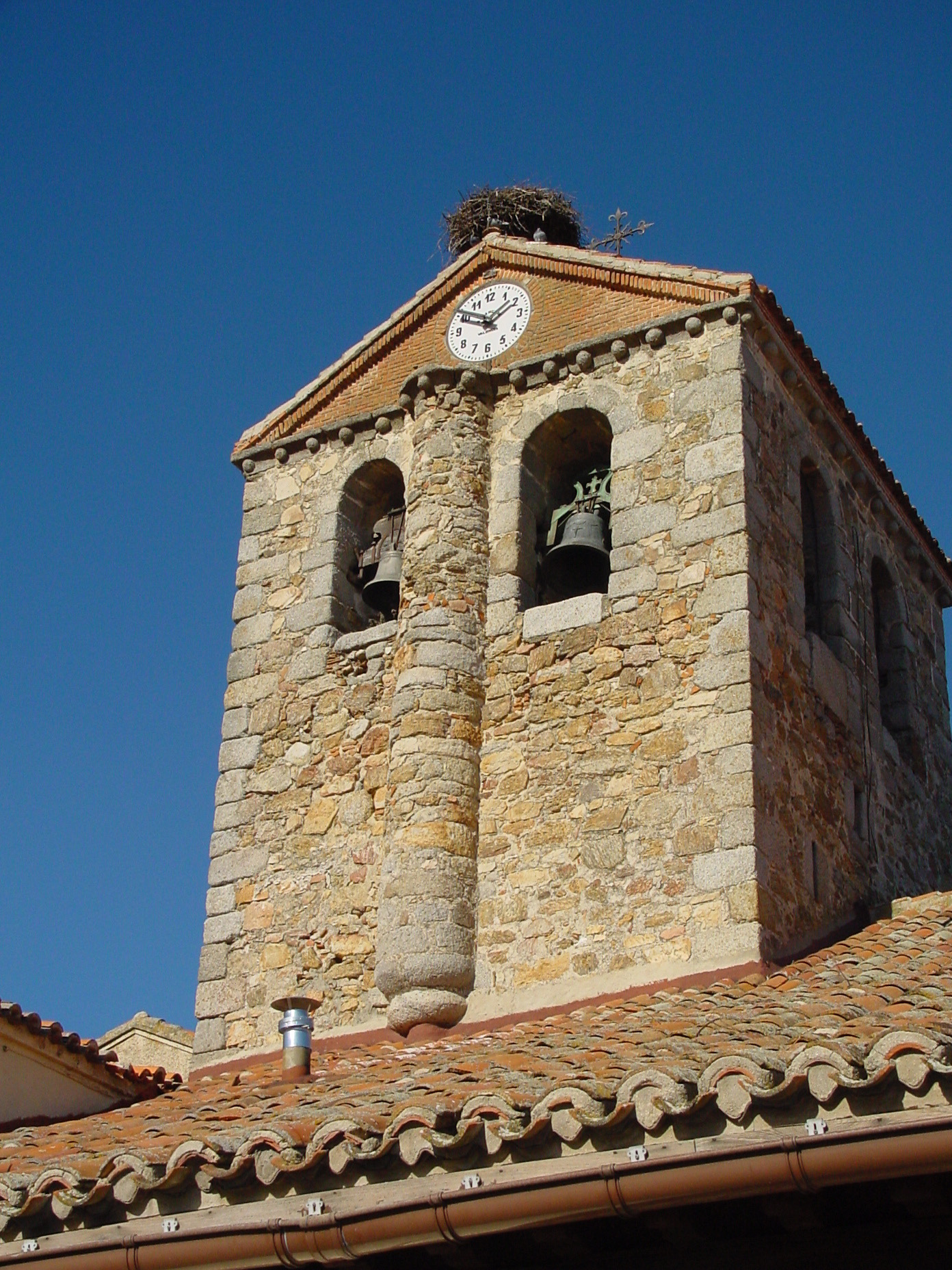 Iglesia Parroquial de la Inmaculada Concepción de Bustarviejo.